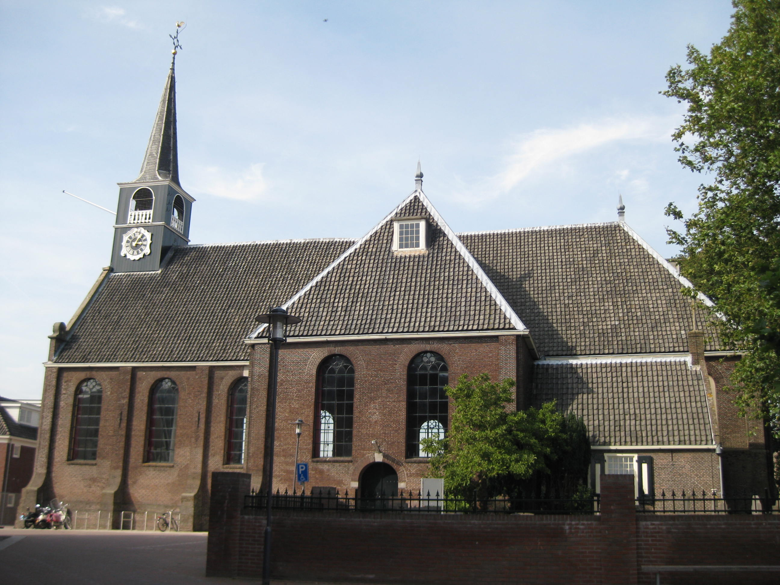 Hervormde Kerk, Kerkbuurt 12, Oostzaan